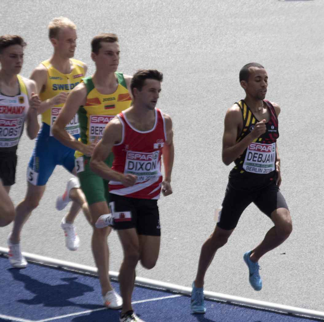 EKB21212 debjani